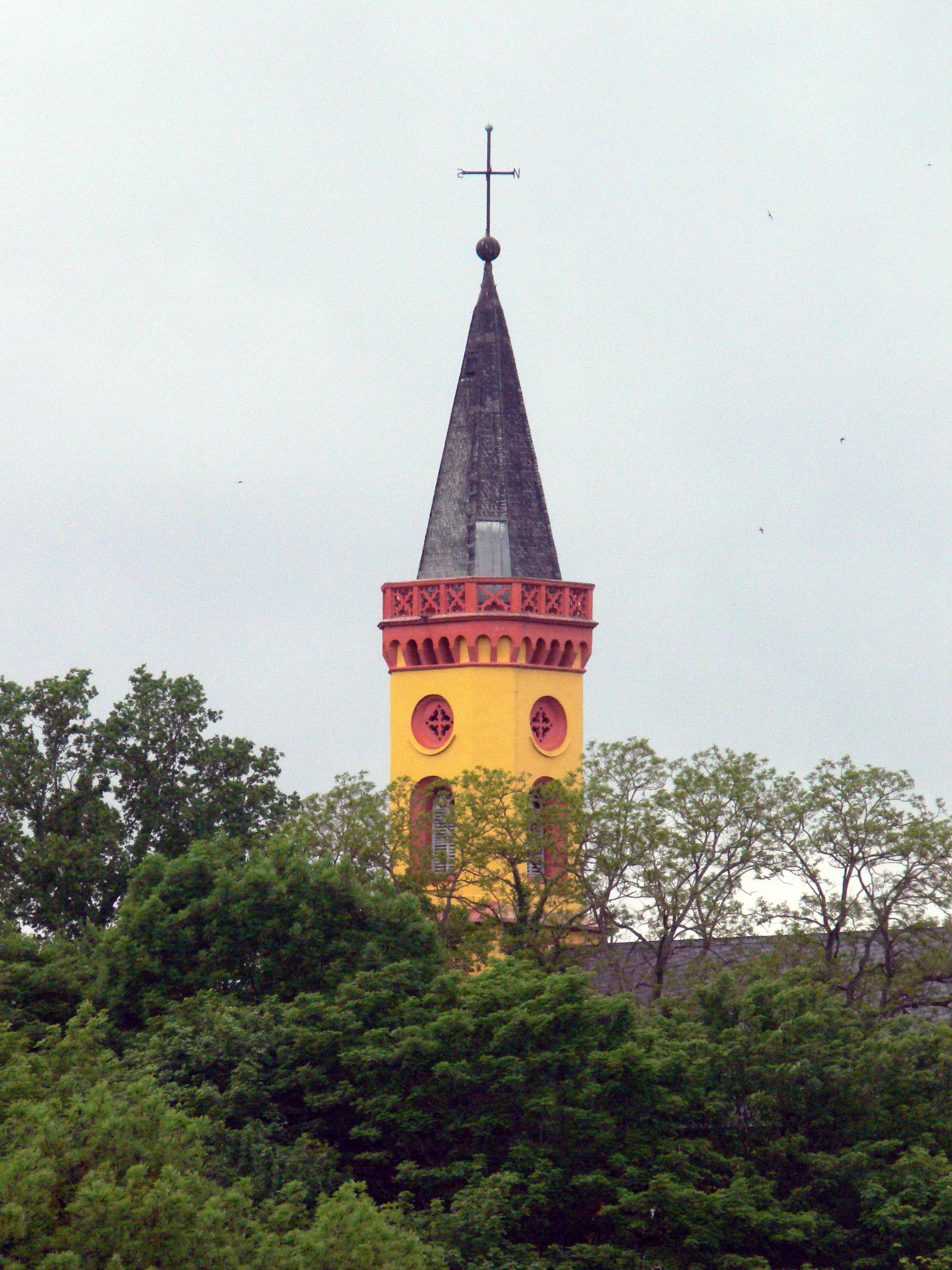 Turm der evangelischen Kirche von St. Peter in Diez/Altendiez.